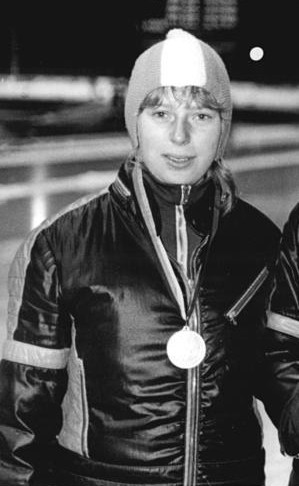 Factual corrections and alternative descriptions are encouraged separately from the original description. Additionally errors can be reported at this page to inform the Bundesarchiv. Original historic description: Sylvia Albrecht ADN-ZB Thieme 12.12.79 Karl-Marx-Stadt: Eisschnellauf- Den ersten von insgesamt neun Meistertitel bei der DDR-Eisschnellaufmeisterschaften auf der Einzelstrecke holte sich auf dem 400-m-Eisoval im Karl-Marx-Städtischen Küchwald Sabine Becker (M..) vom SC Dynamo Berlin über 1500m in der neuen Bahnrekordzeit von 2:12,56 sek. Zweite wurde Karin Kanis (SC Einheit Dresden-re.) vor Titelverteidigerin Sylvia Albrecht (SC Dynamo Berlin).